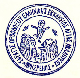 Печат на гръцката църковна община в Призрен